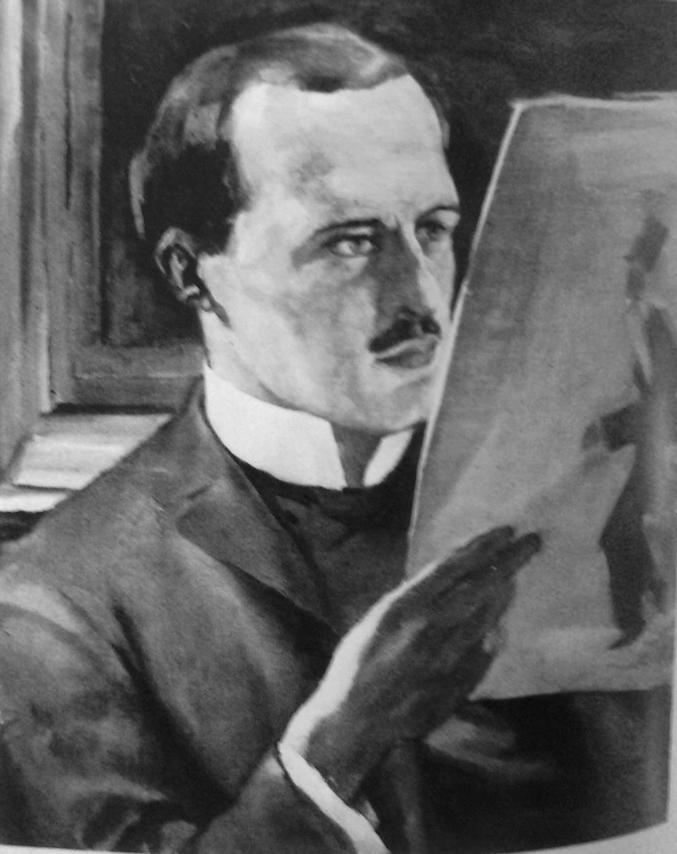 Portrait Willi Geiger (Maler: Albert Weisgerber, 1906)